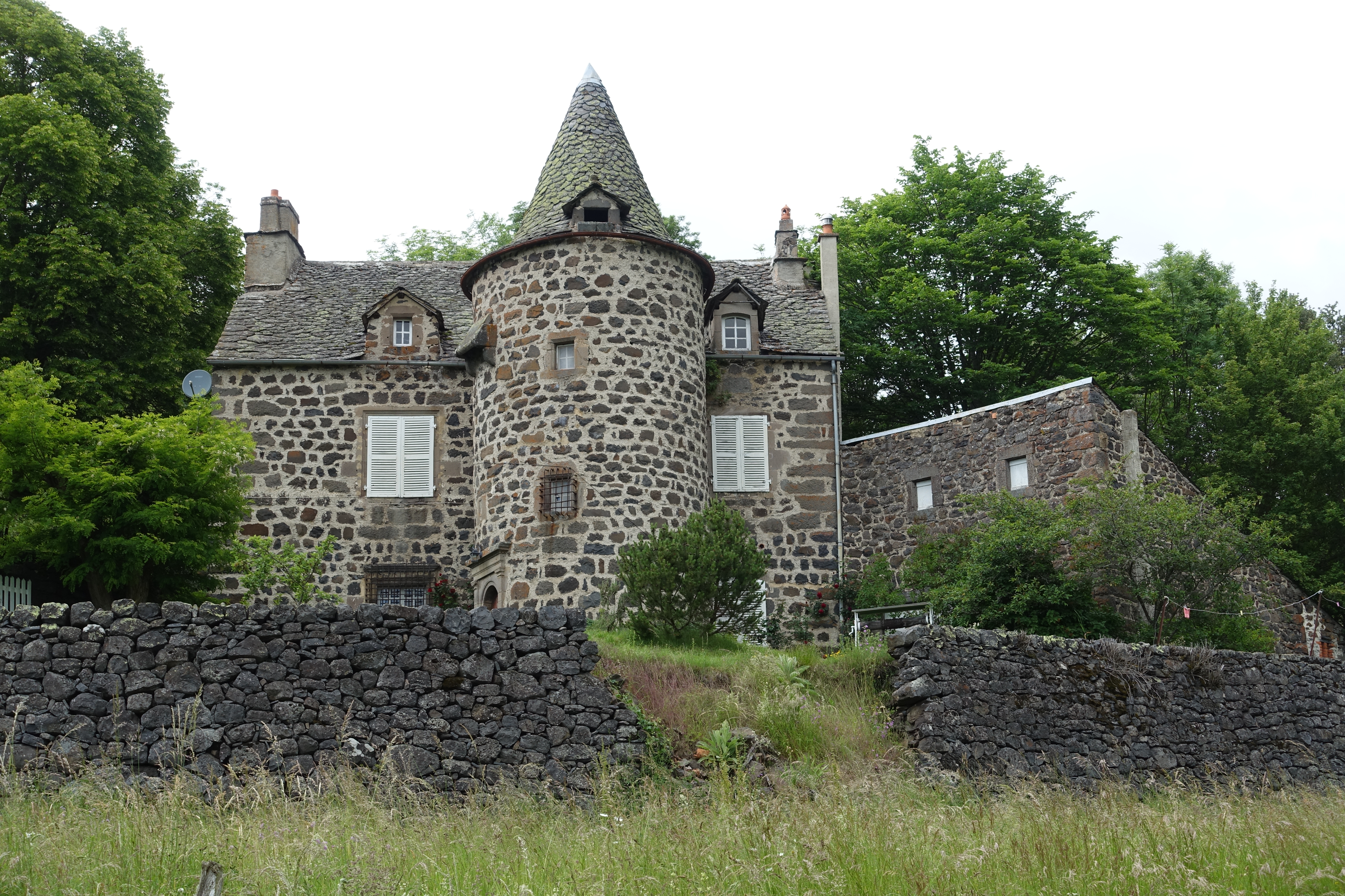 Château de Moissac, construit par le seigneur d'Auzolles à la fin du 16ème siècle